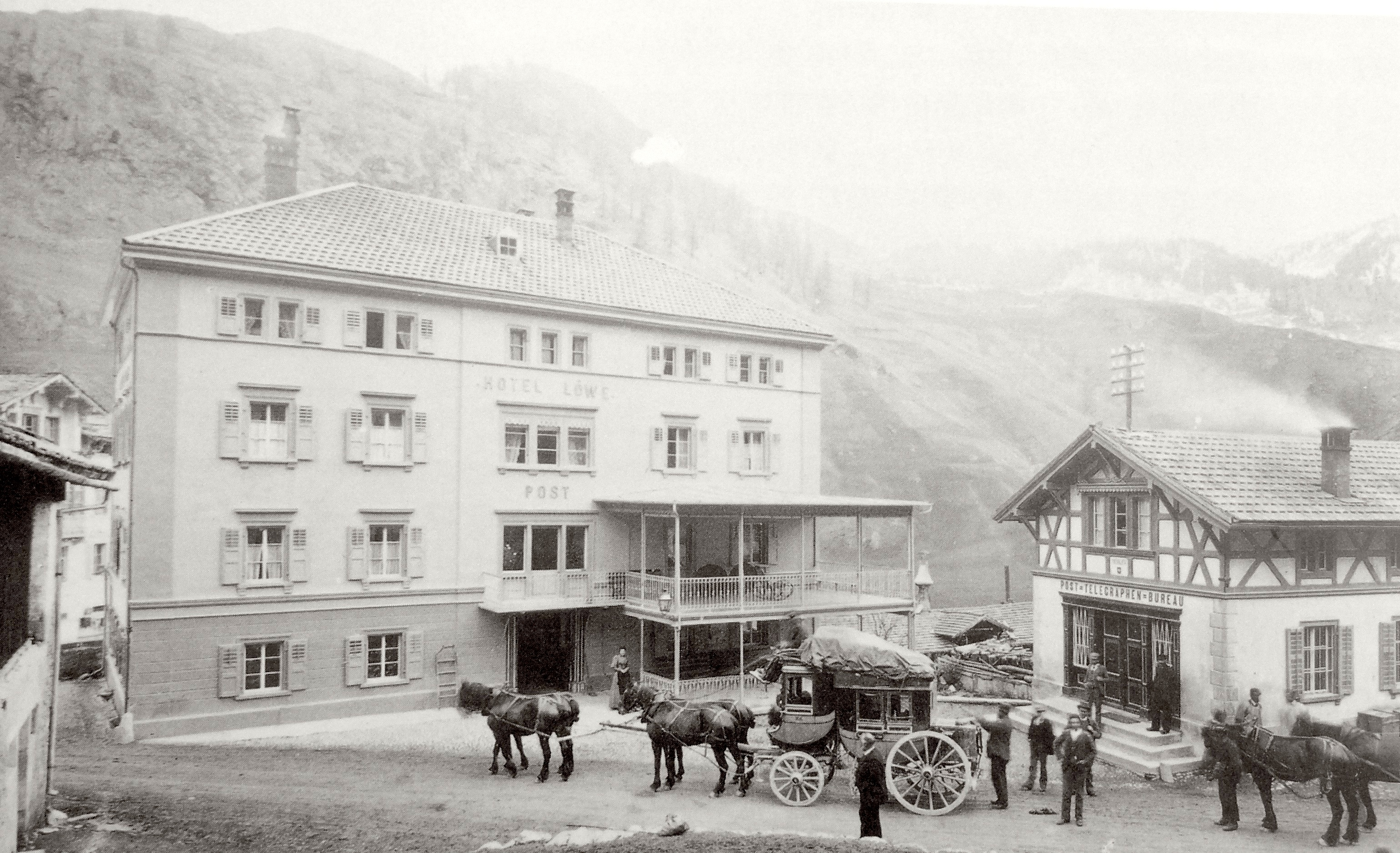 Posthotel Löwen in Mulegns GR: erste bekannte Aufnahme 1896, von Romedo Guler (1836-1909), noch ohne den Anbau rechts, aber mit neuer Veranda. Rechts das Postbüro